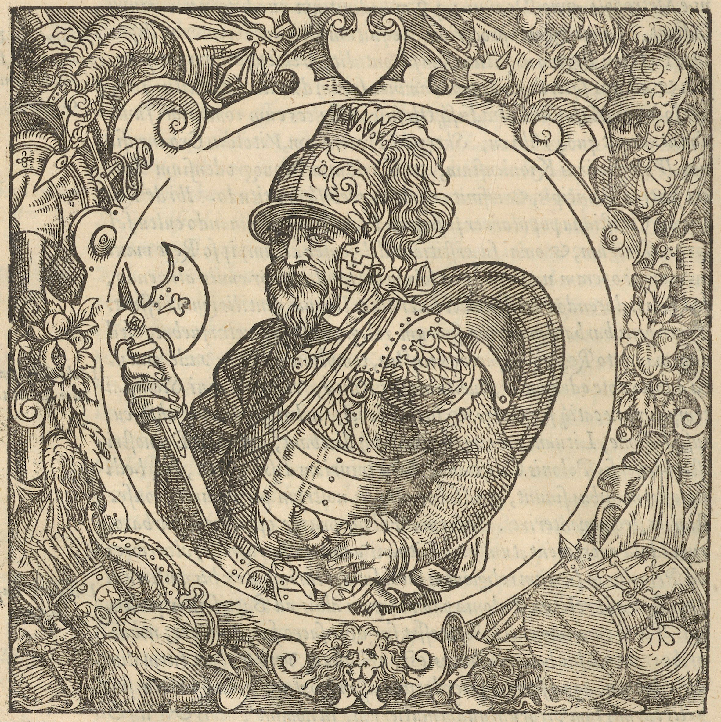 Беларуская (тарашкевіца): Уяўны партрэт Скіргайлы (Skirgajła)